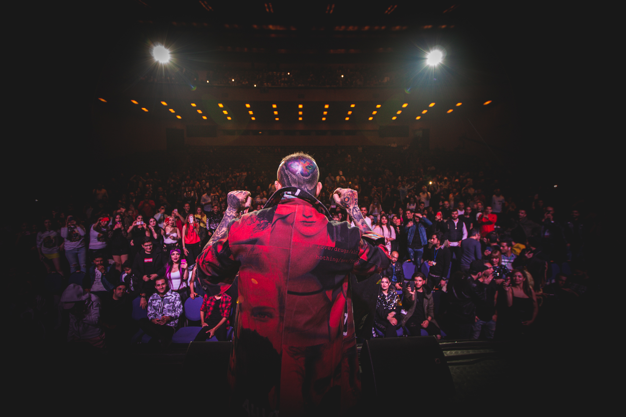 عکس توسط پوریا افخمی در شهر تفلیس ثبت شده است.